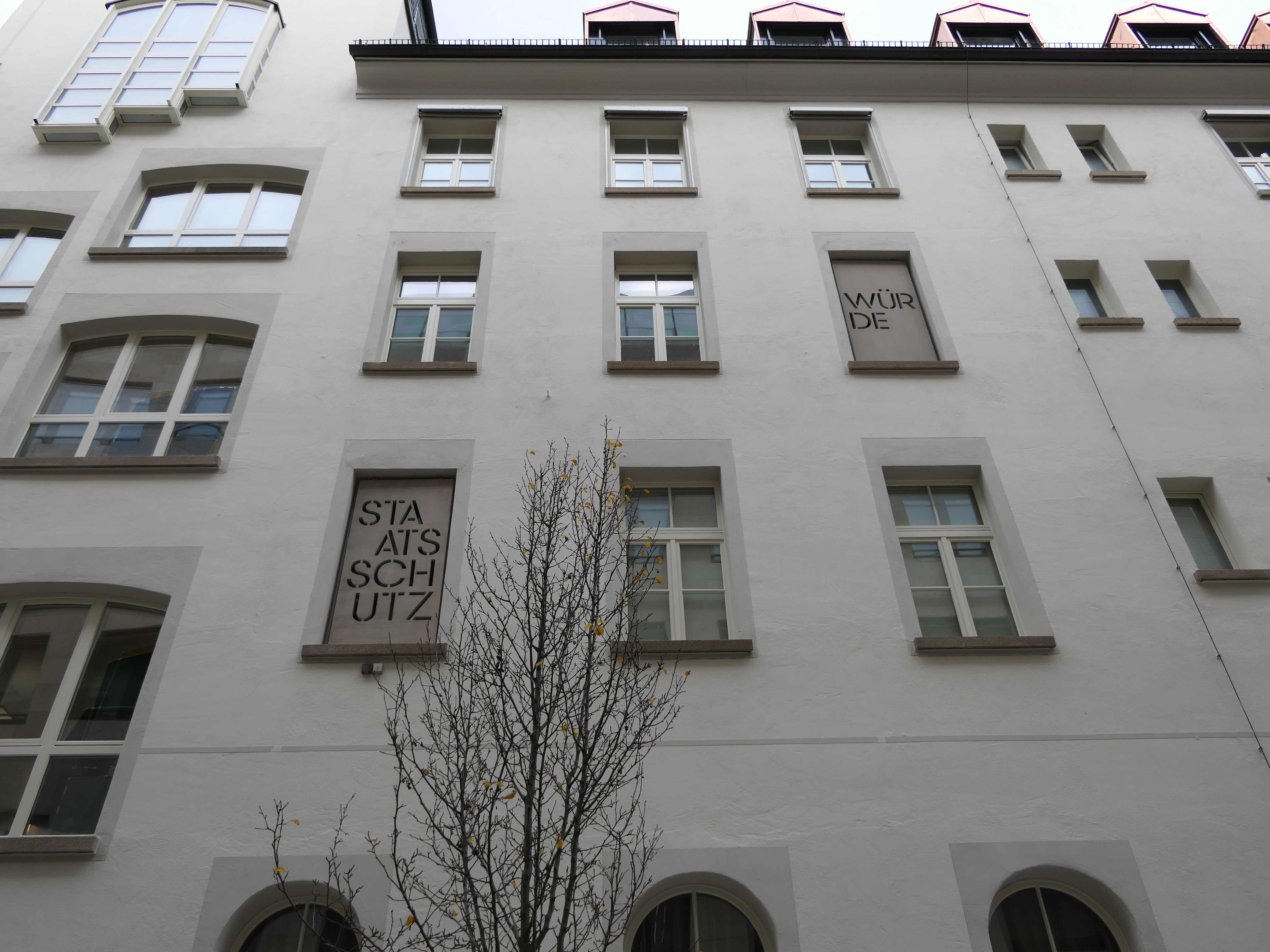 Das Hotel Silber nach seinem Umbau. Rückseite, rechter Gebäudeteil.